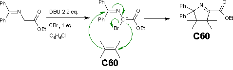 Ejemplode reacción de Bingel